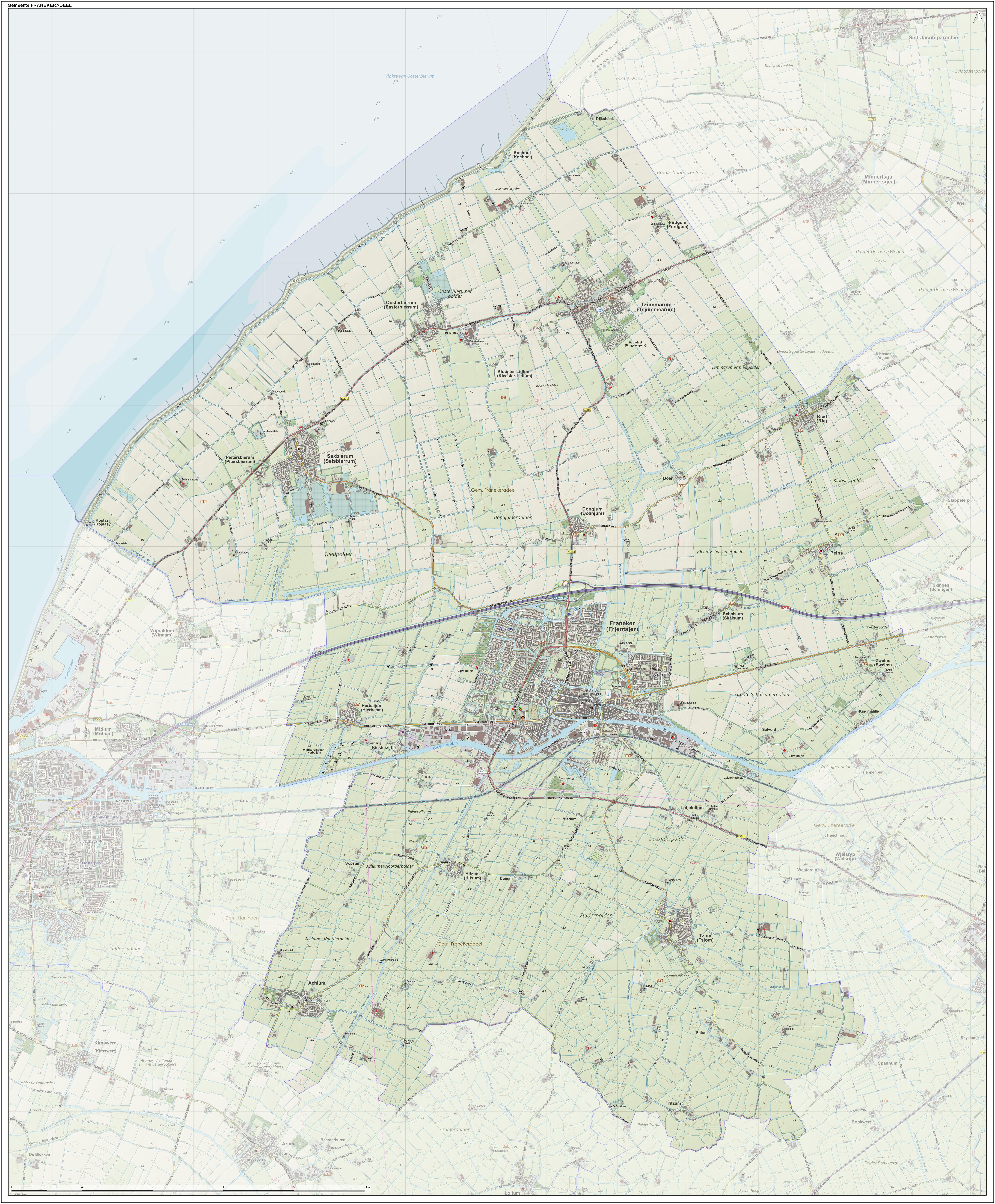 Topografische gemeentekaart. Resolutie: 400 pixels/km. Kaartbeeld samengesteld uit de open geodata van de Top10NL en Top25namen (Kadaster), Creative Commons-BY licentie. Gebouwvlakken uit open geodata BAG extract. Wegen uit de OpenStreetMap, OpenStreetMap community. Reliëfschaduw uit de Actuele Hoogtekaart AHN2. Samenstelling en kleurenschema: Jan-Willem van Aalst, met QGIS. Zie ook de Legenda.